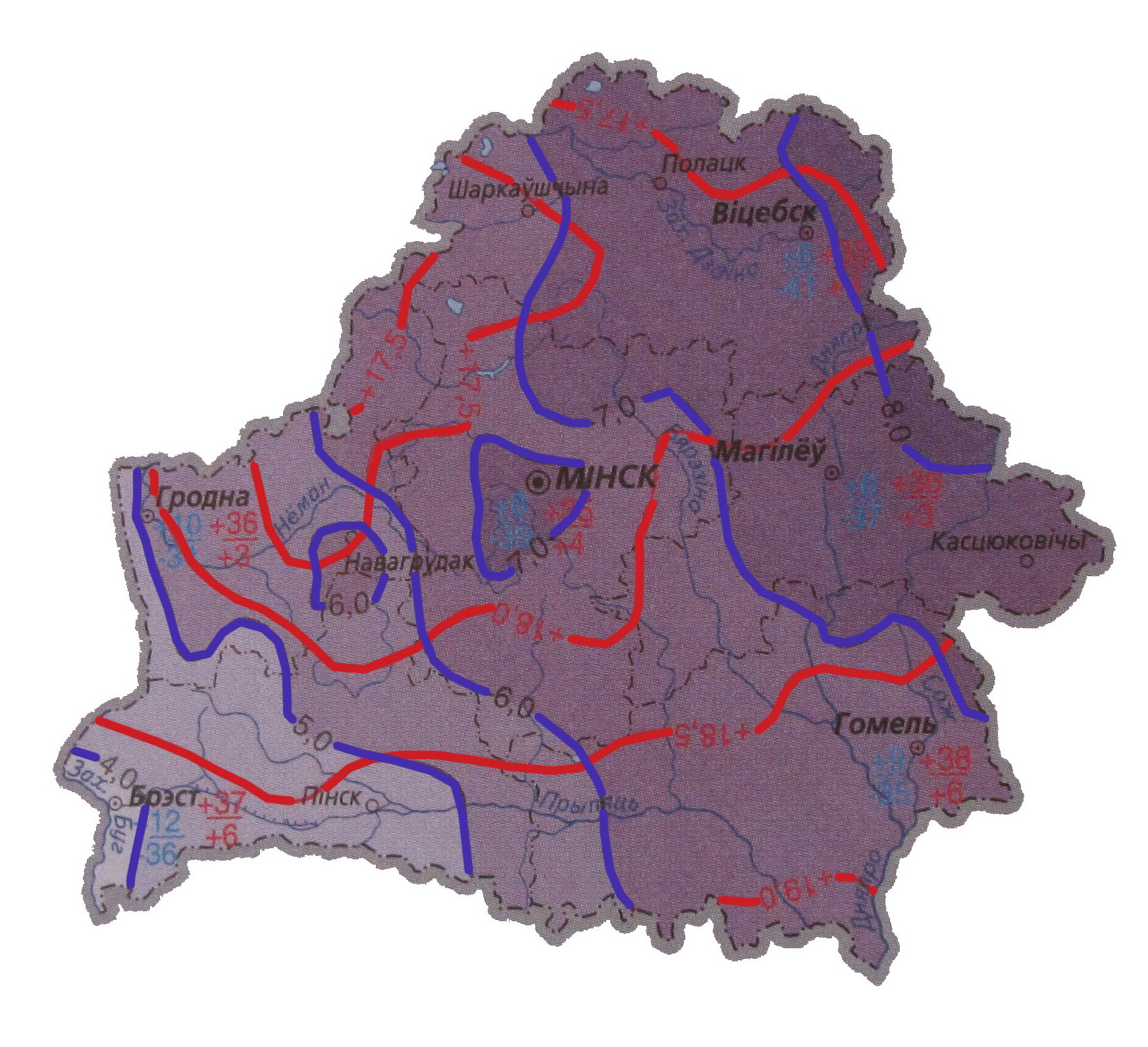 Ізатэрмы на мапе Беларусі